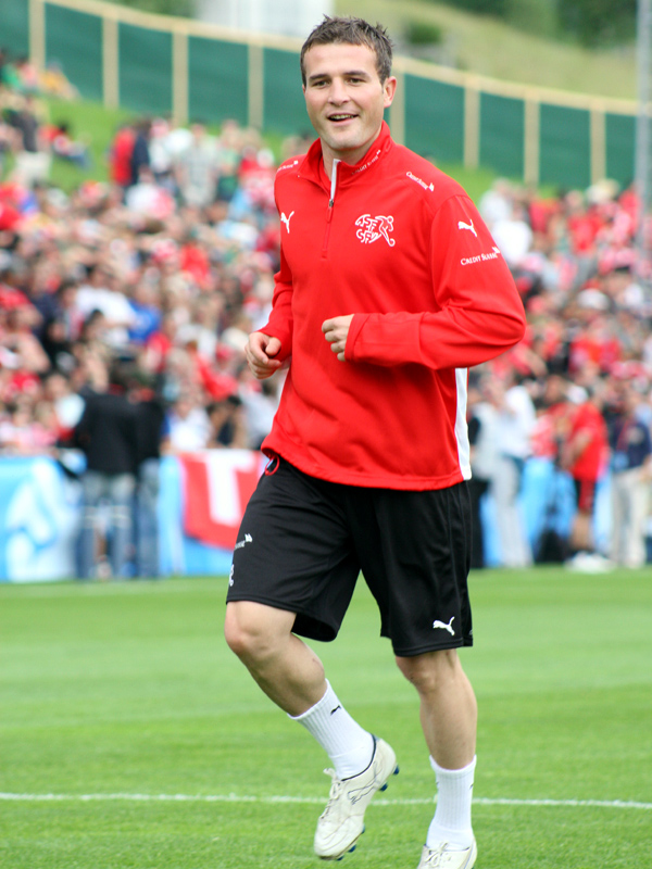 Alex Frei im Trainingslager der Schweizer Fussballnationalmannschaft vor der Euro 2008